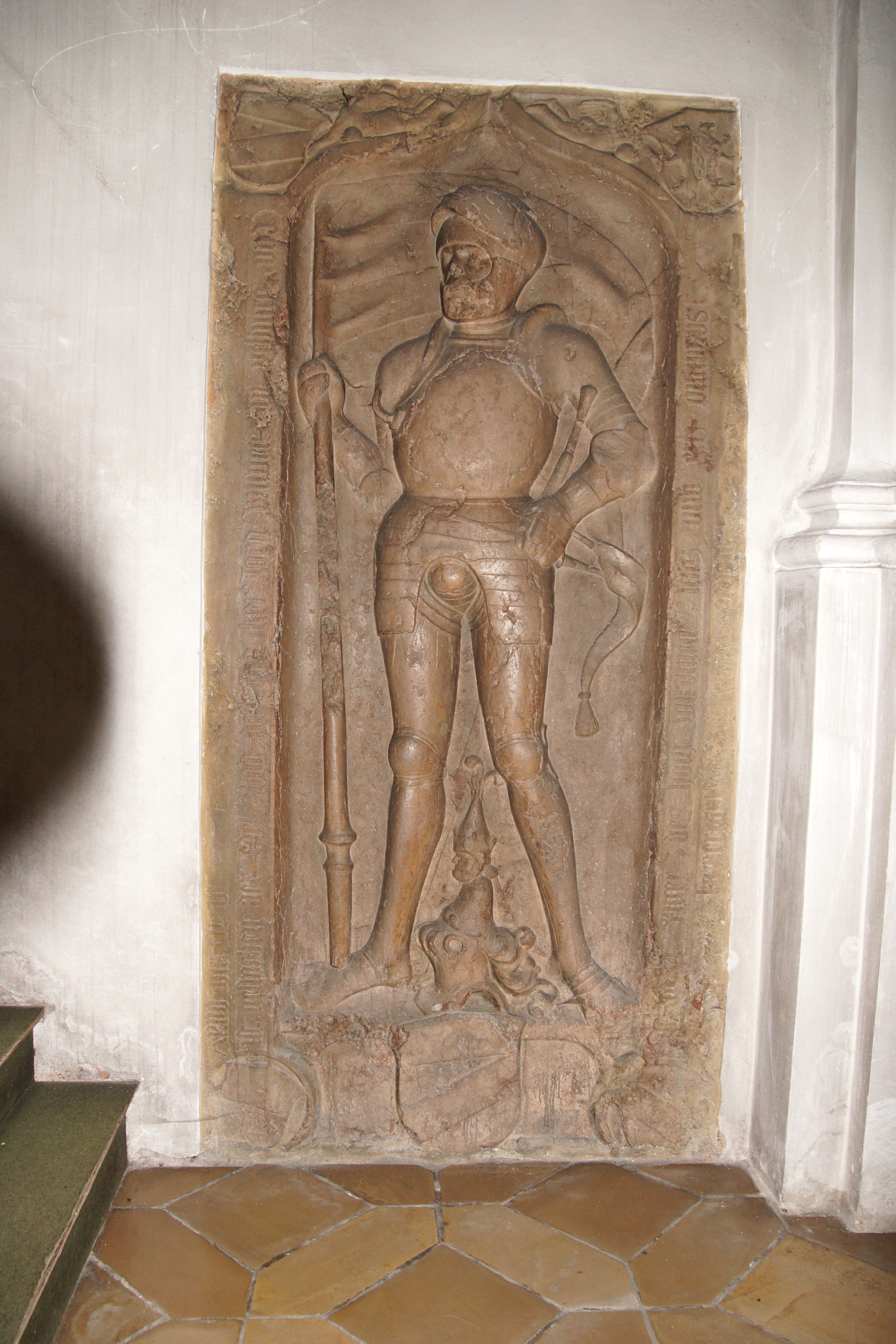 Die Pfarrkirche St. Johann Baptist in der Oberpfälzer Kleinstadt Velburg